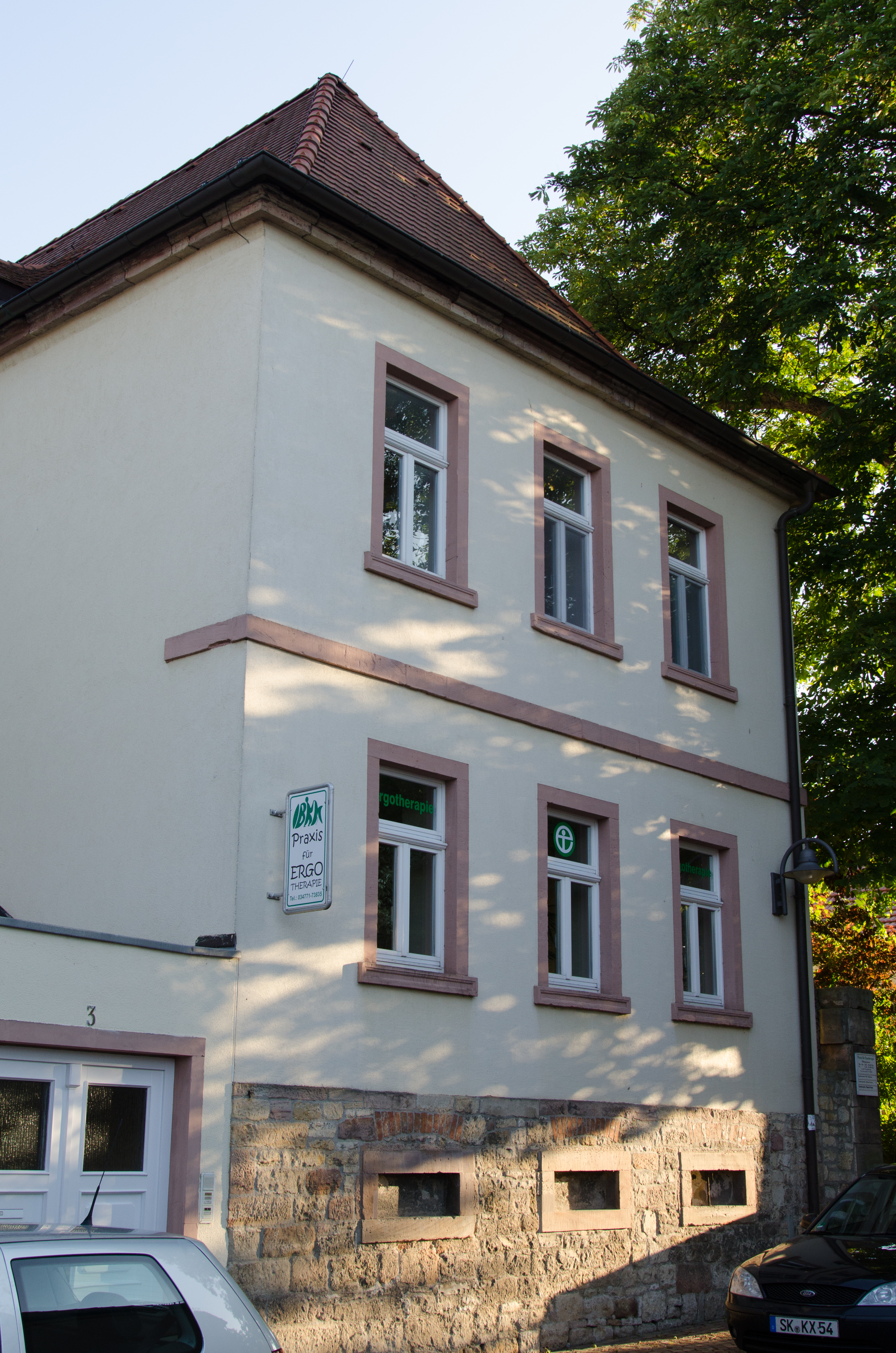 Querfurt, Neue Straße 3